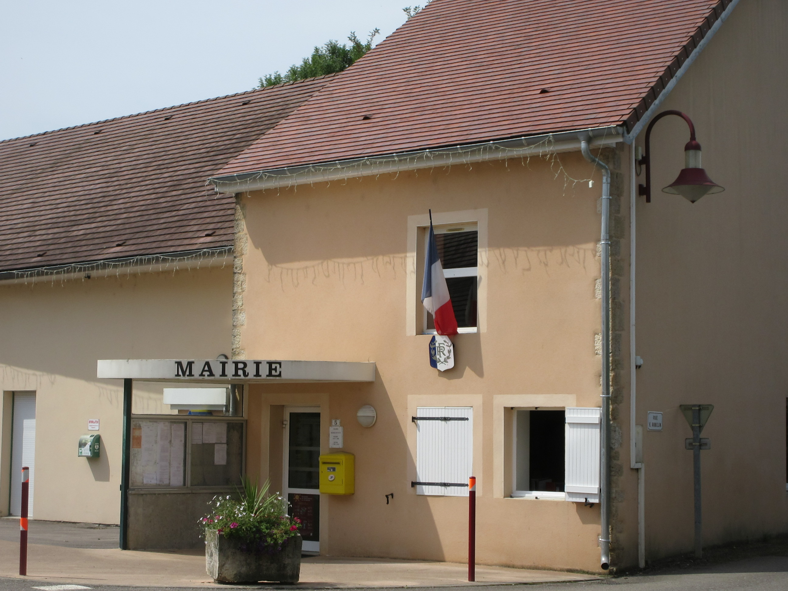 Mairie de Frébuans.